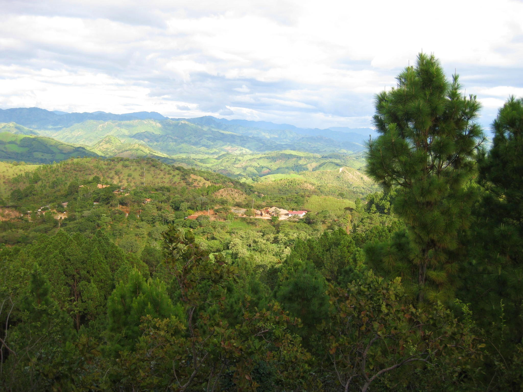 Una Vista hacia la comunidad o comaraca el cerro ofrecida desde la cuspide del cerro san rafael.